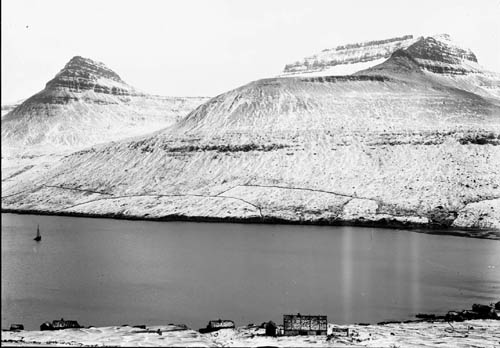 Fuglafjørður, Faroe Islands